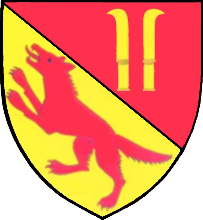 Der Wolf symbolisiert den Passauer Wolf, was auf die Missionierung durch das Bistum Passau und die jahrhundertelange Zugehörigkeit zu diesem hinweist. Die zwei Rebmesser (Weinmesser) führten die Grafen Dietrichstein, einst Inhaber der Burg und Grundherren von Sitzendorf, in ihrem Wappen. Die Weinmesser im Wappen der Grafen Dietrichstein gehen auf eine Sage zurück. Während der Türkenkriege konnte der Graf sein Leben nur dadurch retten, dass er sich als einfacher Weinhauer ausgab und die damit verbundenen schweren Arbeiten verrichtete. Aus Dank und zur Erinnerung nahm er dieses Arbeitsgerät in sein Wappen auf.